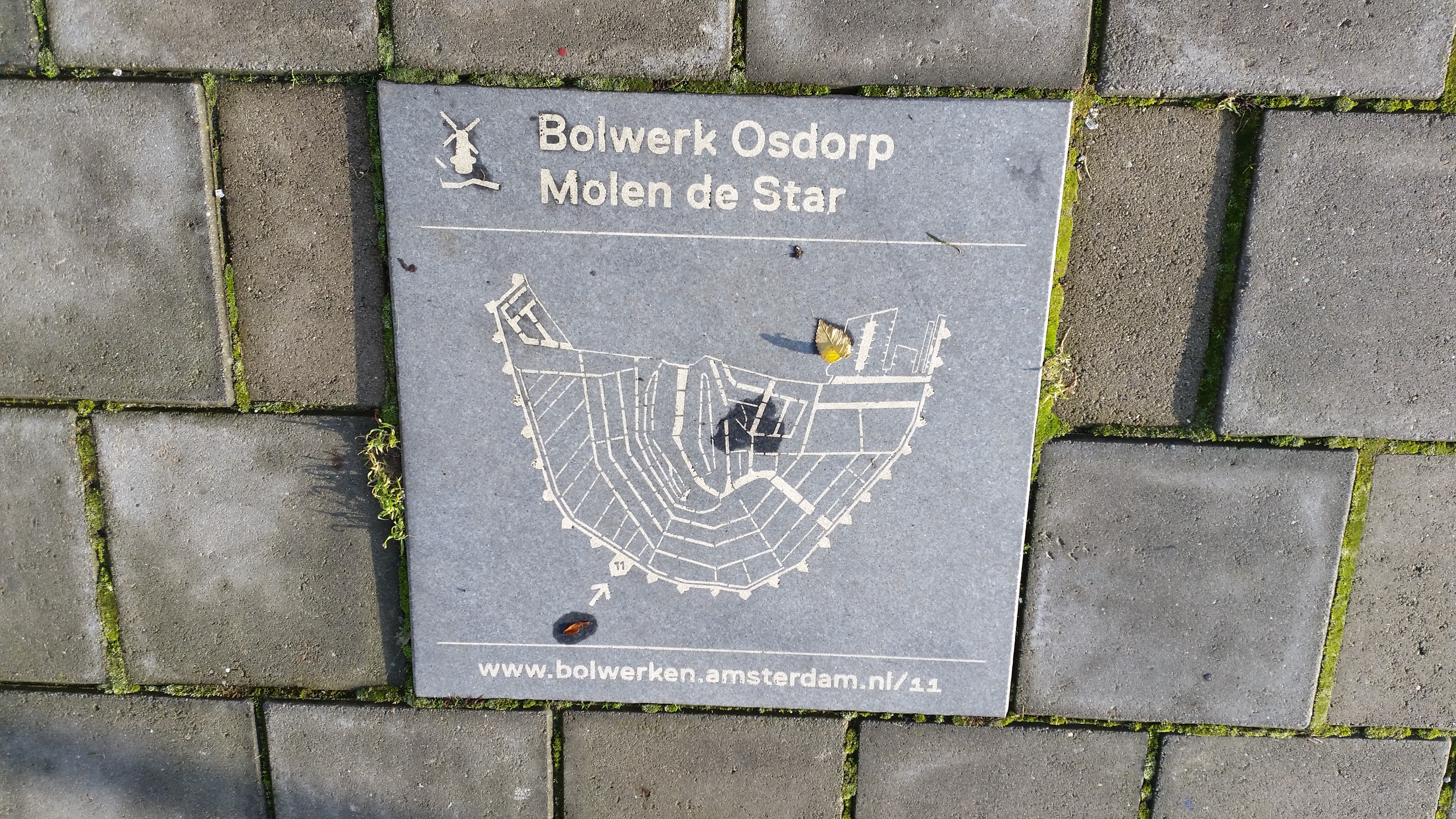 Tegel 11 uit de Bolwerkenroute van Rob van Reijn en Joost Grootens in de Nieuwe Passeerdersstraat, Amsterdam